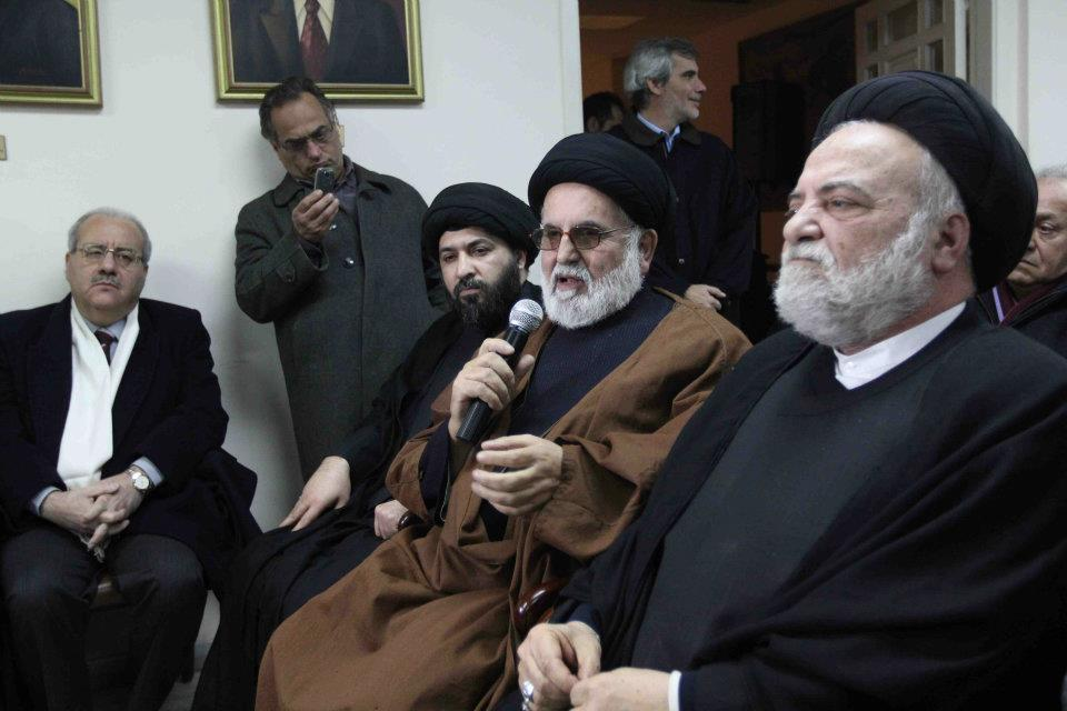 السيد محمد حسن الامين والسيد هاني فحص والمحامي ماجد فياض في إحدى الندوات في لبنان - عام 2012